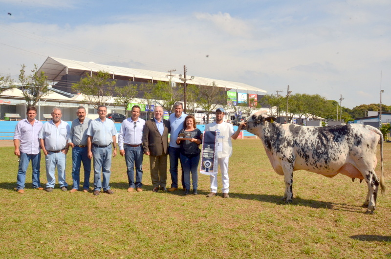 Representando o governador Geraldo Alckmin, o secretário Arnaldo Jardim participou da solenidade de abertura da 42ª Exposição Agropecuária Industrial e Comercial (EAPIC), no Recinto de Exposições José Rui de Lima Azevedo, em São João da Boa Vista. Ele destacou as prioridades da Secretaria no desenvolvimento da agropecuária paulista.